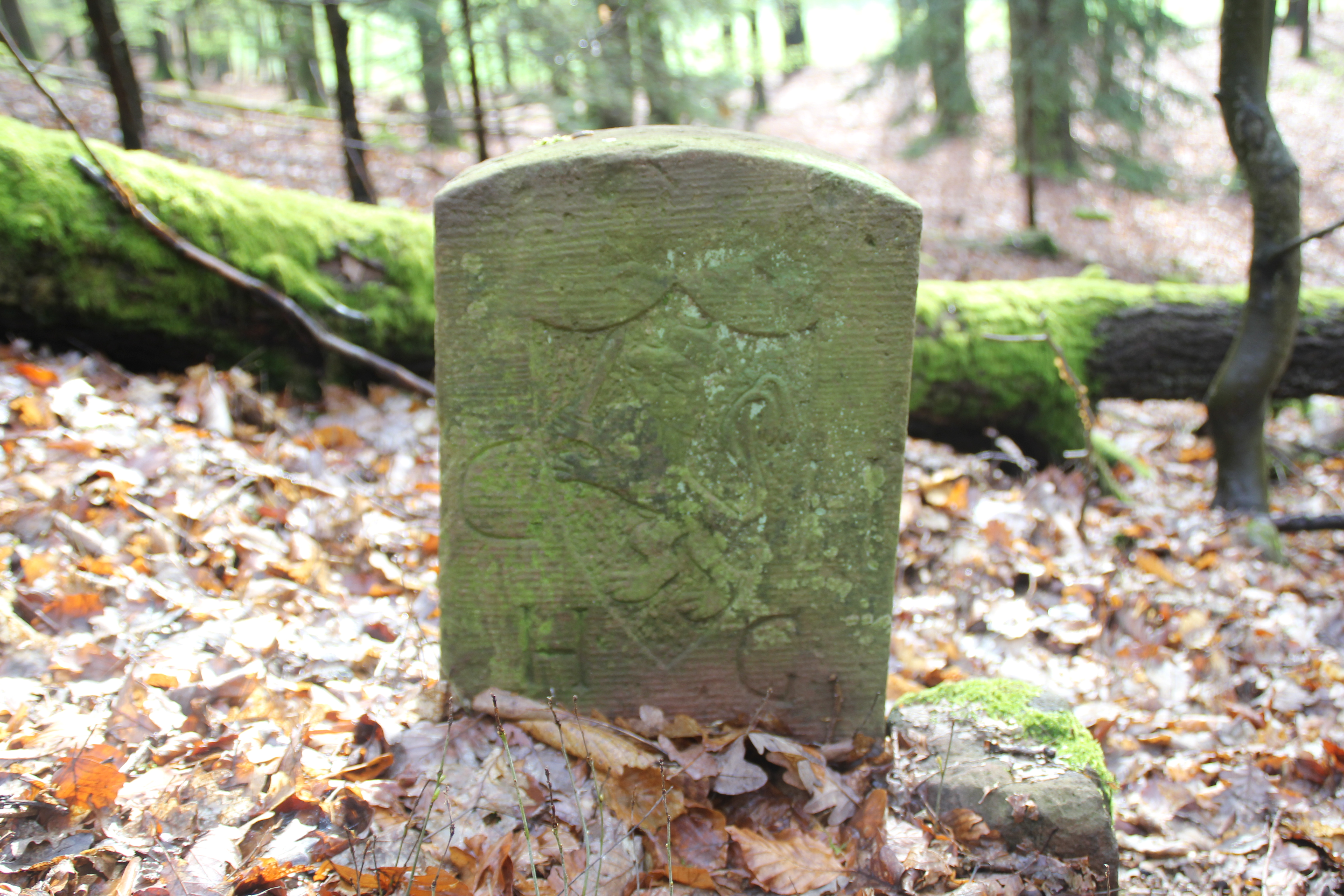 Grenzstein zwischen Geiselbach und Huckelheim